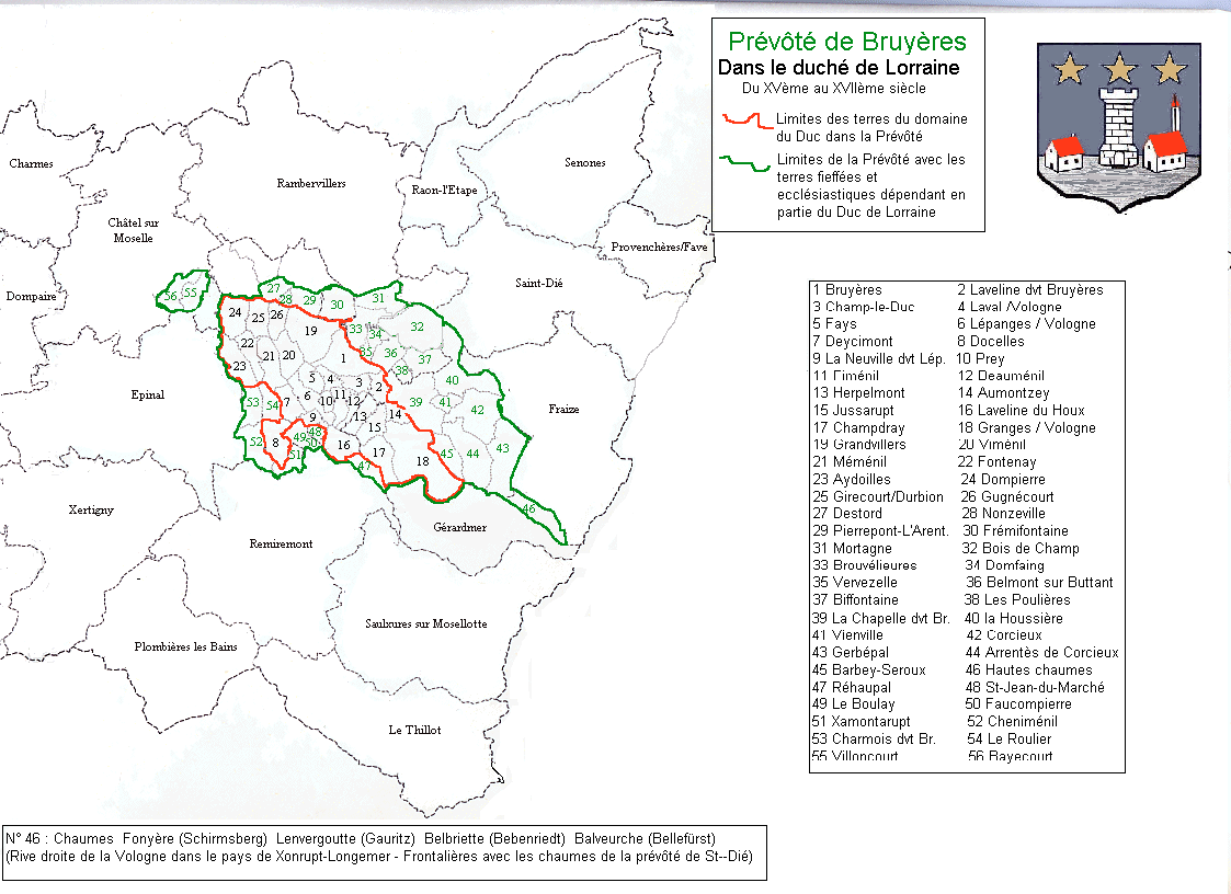 Carte de la prévôté de Bruyères, Lorraine ducale jusqu'au XVIIIème siècle.